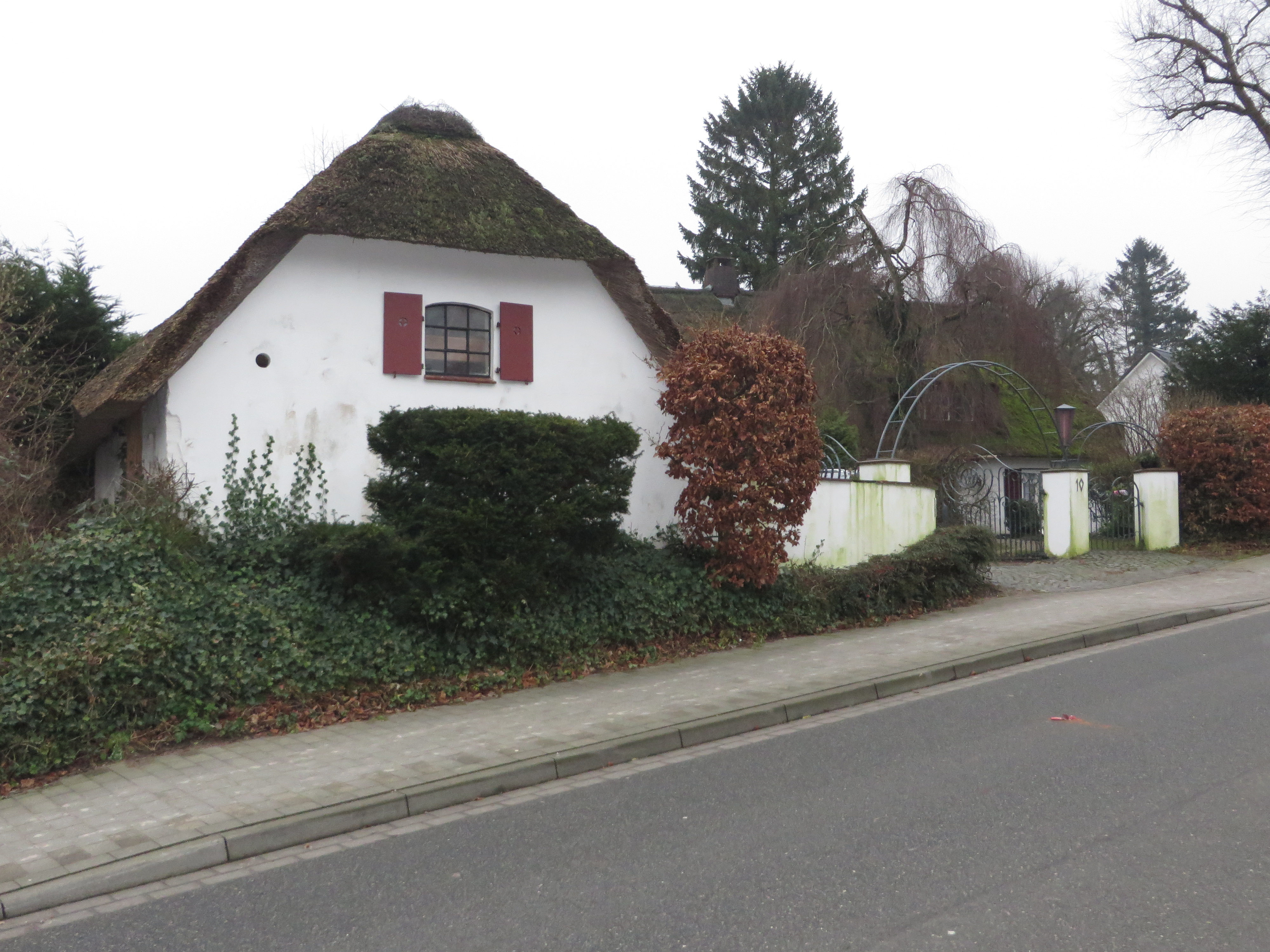 Straße Solitüde 10 bis 8 (Flensburg 1. Januar 2015), Bild 01